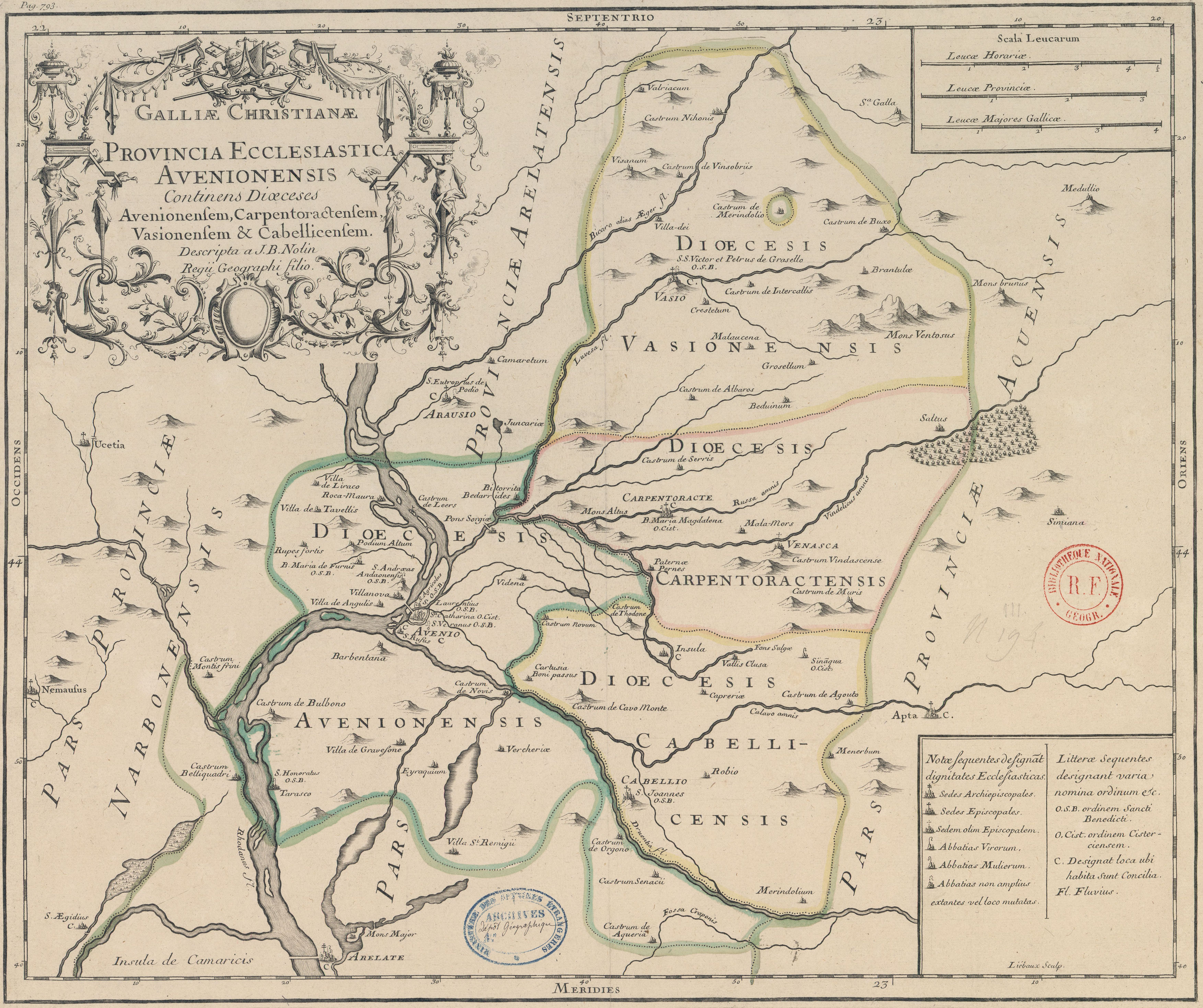 Carte de l'ancienne province ecclésiastique d'Avignon, insérée dans le Tome 1 de la Gallia Christiana (1715).